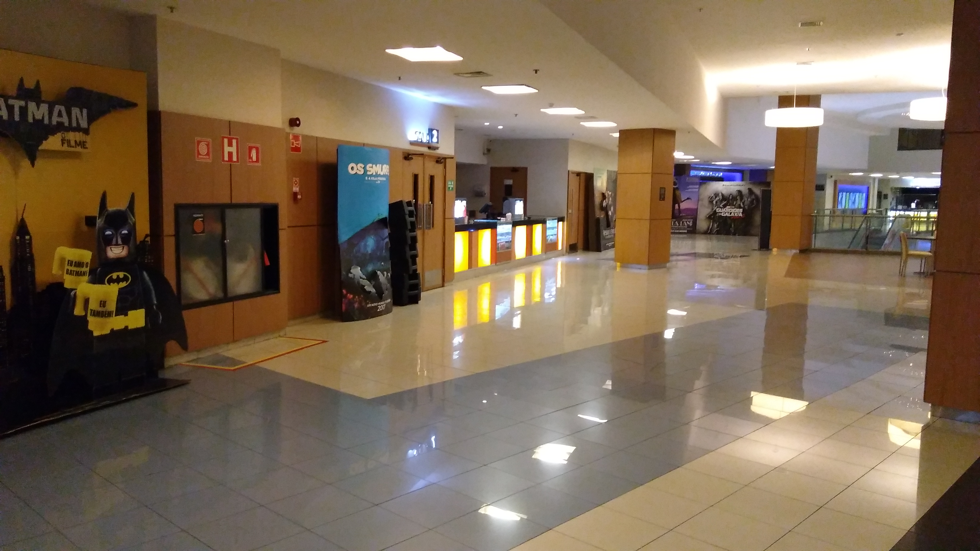 Vista do corredor direito do UCI Kinoplex Iguatemi Fortaleza